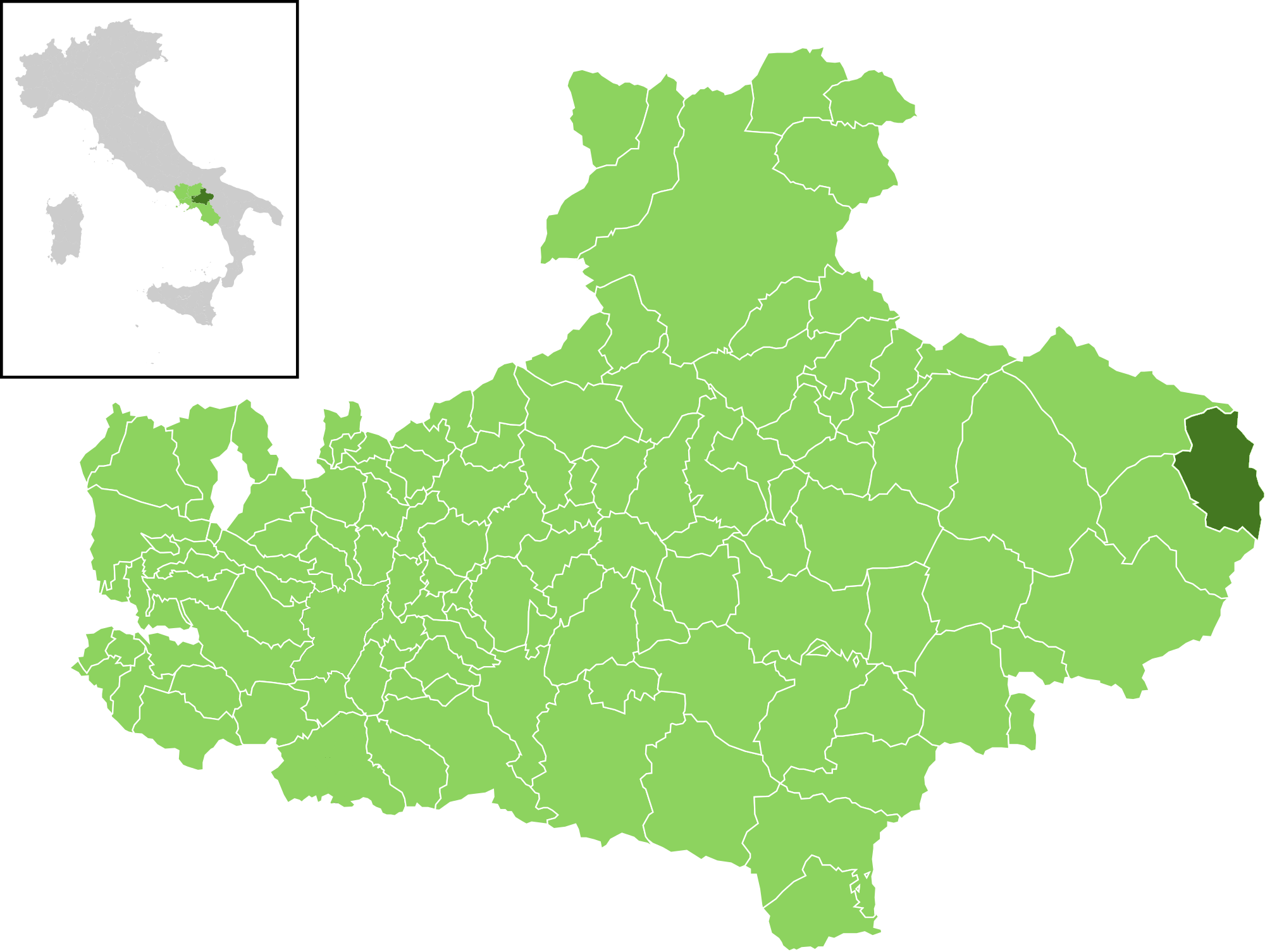 Posizione del comune all'interno della provincia di Avellino